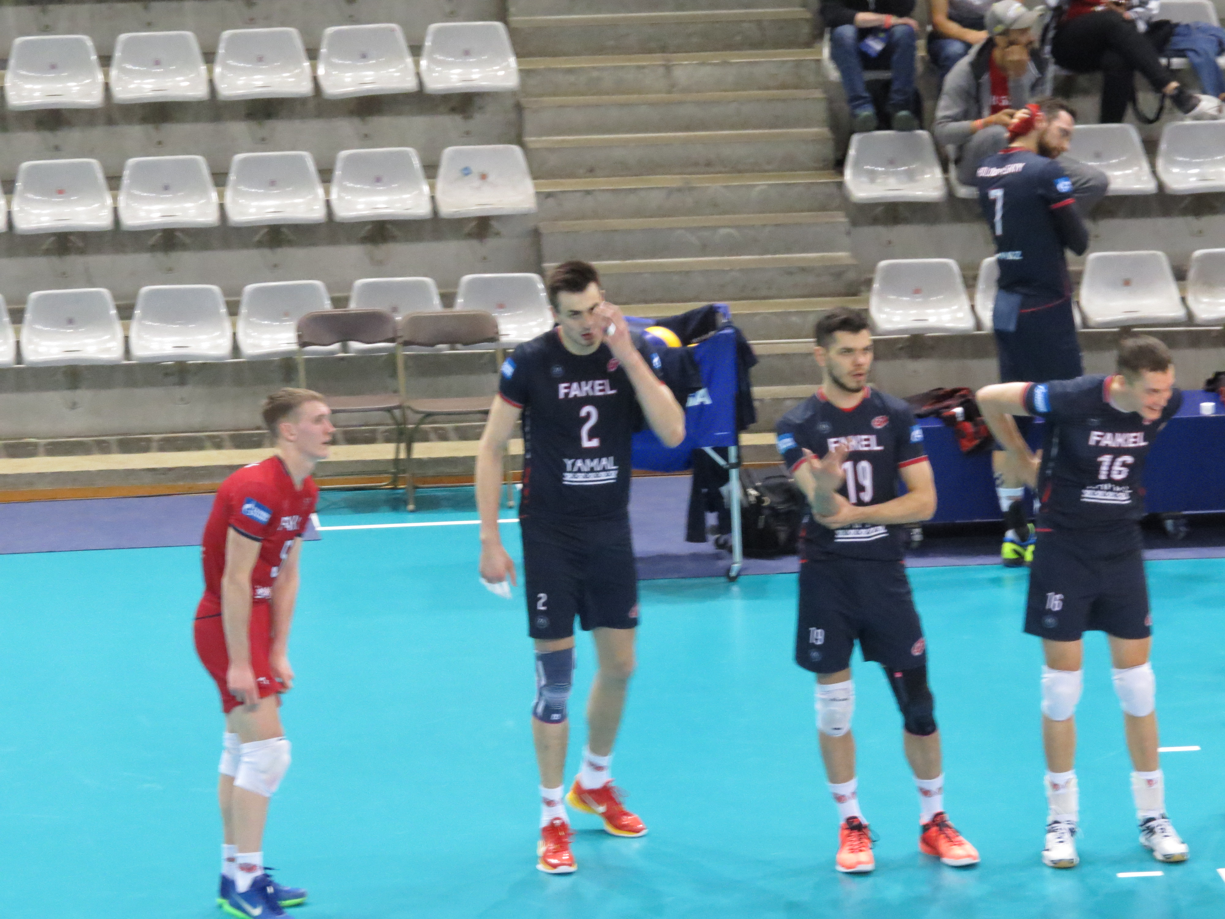 Photos réalisées lors de la finale aller de la Challenge Cup entre le Chaumont Volley-Ball 52 et le Fakel Novy Ourengoï à Paris (salle Charpy) 2 VLASOV Ilia 5 ALEKSEEV Andrey L 16 BEZRUKOV Valentin 19 BONDARENKO Mikhail